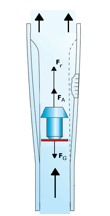 Prinzip Kraftverteilung